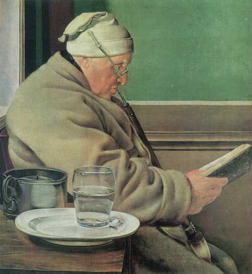 Der Richter Jacob Wilder; Hamburg, Kunsthalle